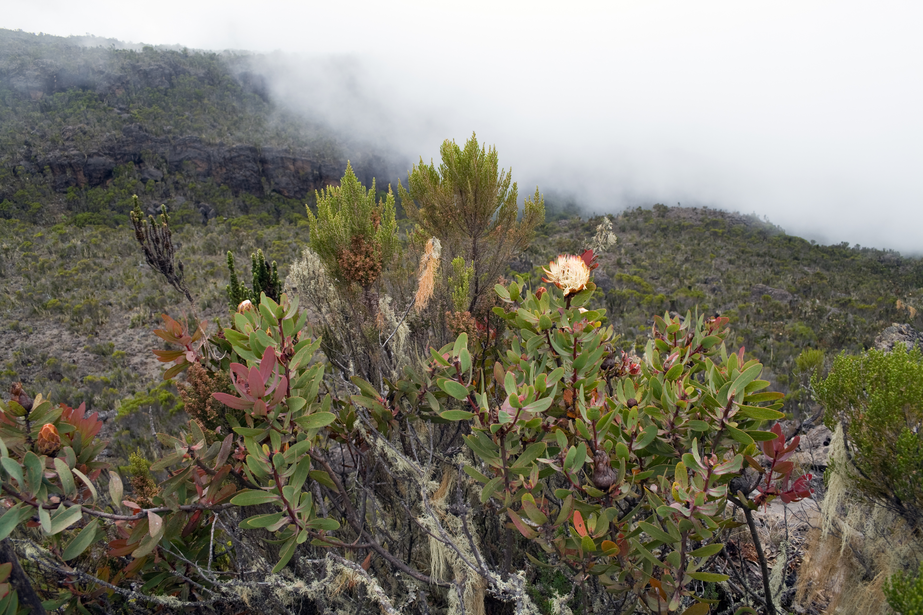 Vegetation on Kilimanjaro